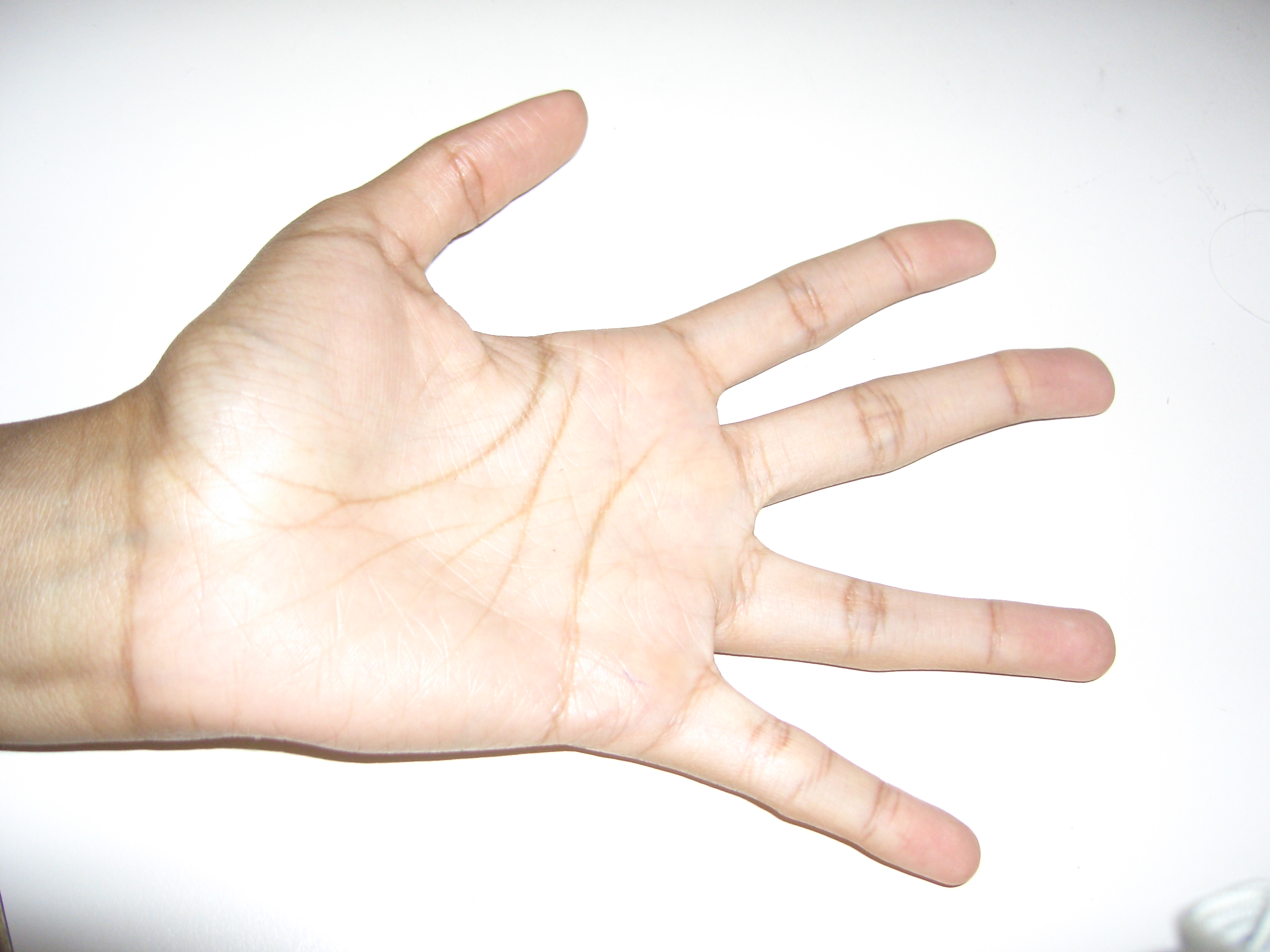 A human hand